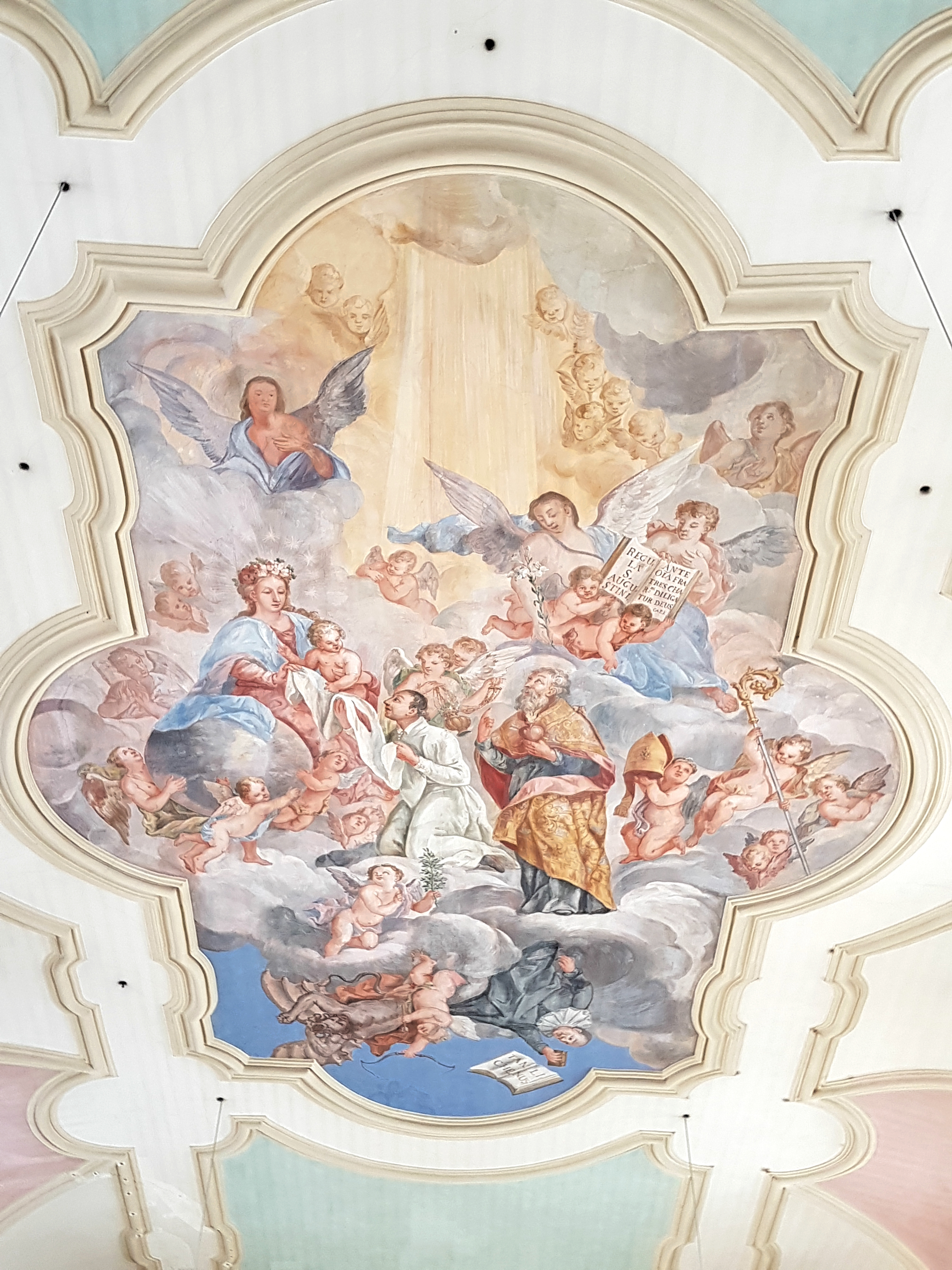 St. Georg (Hohenschäftlarn), das große mehrere Joche einnehmende Langhausfresko.